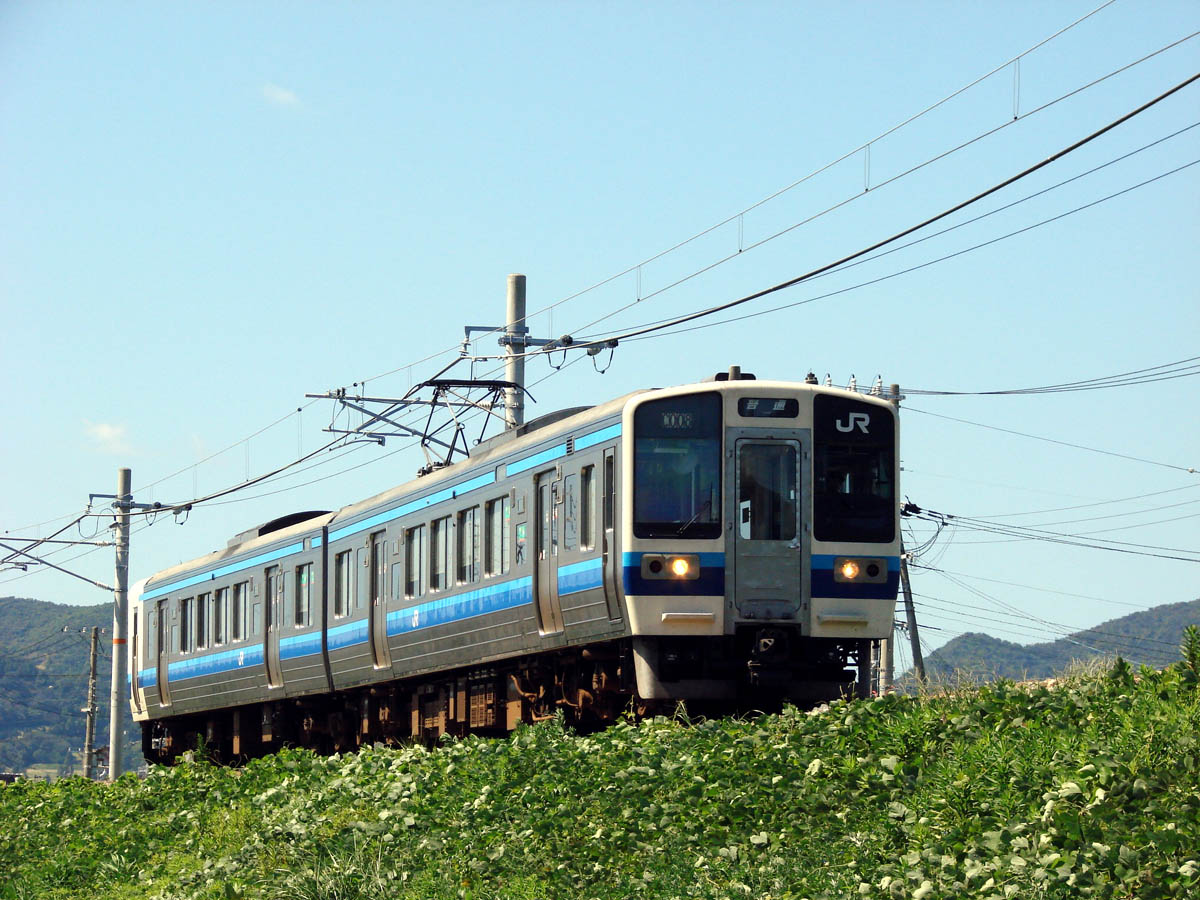 JR西日本213形